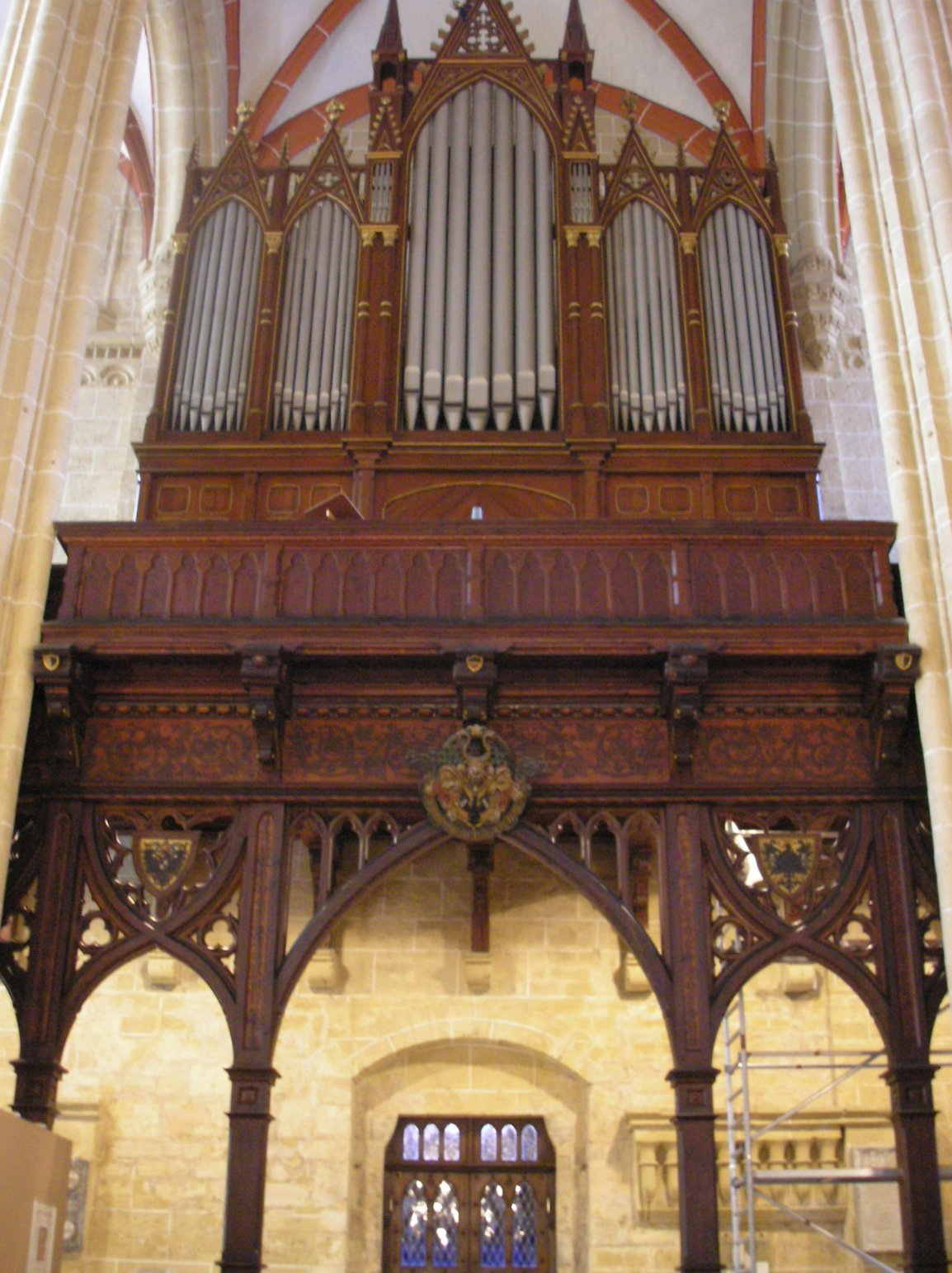 Die Orgel der Marienkirche in Mühlhausen (Thüringen).